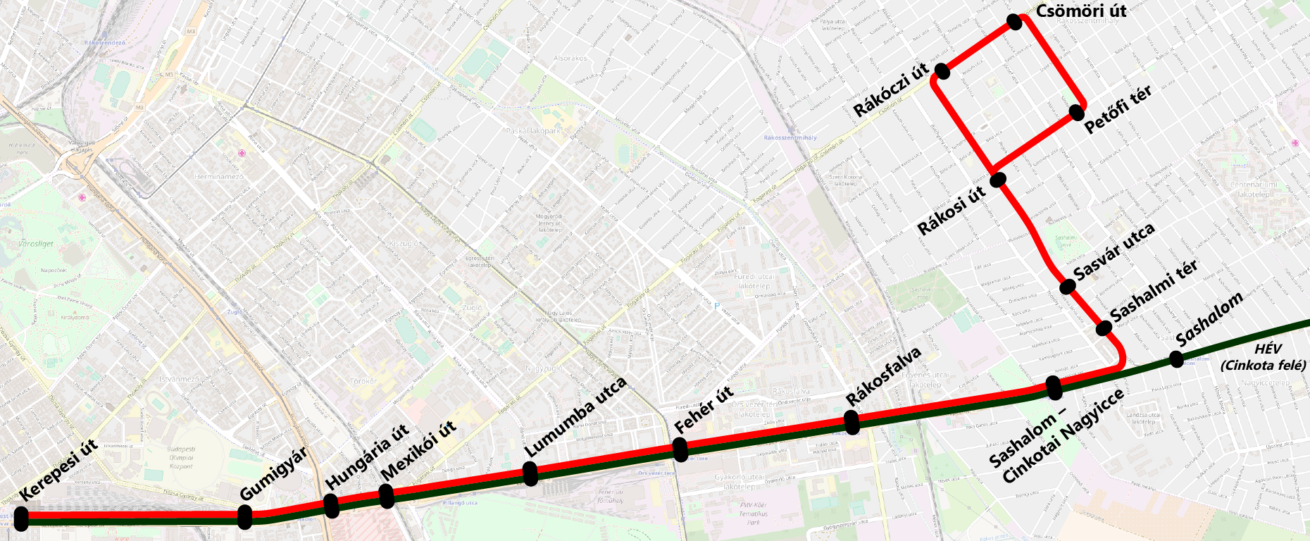 Az egykori Kerepesi út-Rákosszentmihály HÉV-vonal (R járat) útvonala This map may be incomplete, and may contain errors. Don't rely solely on it for navigation.